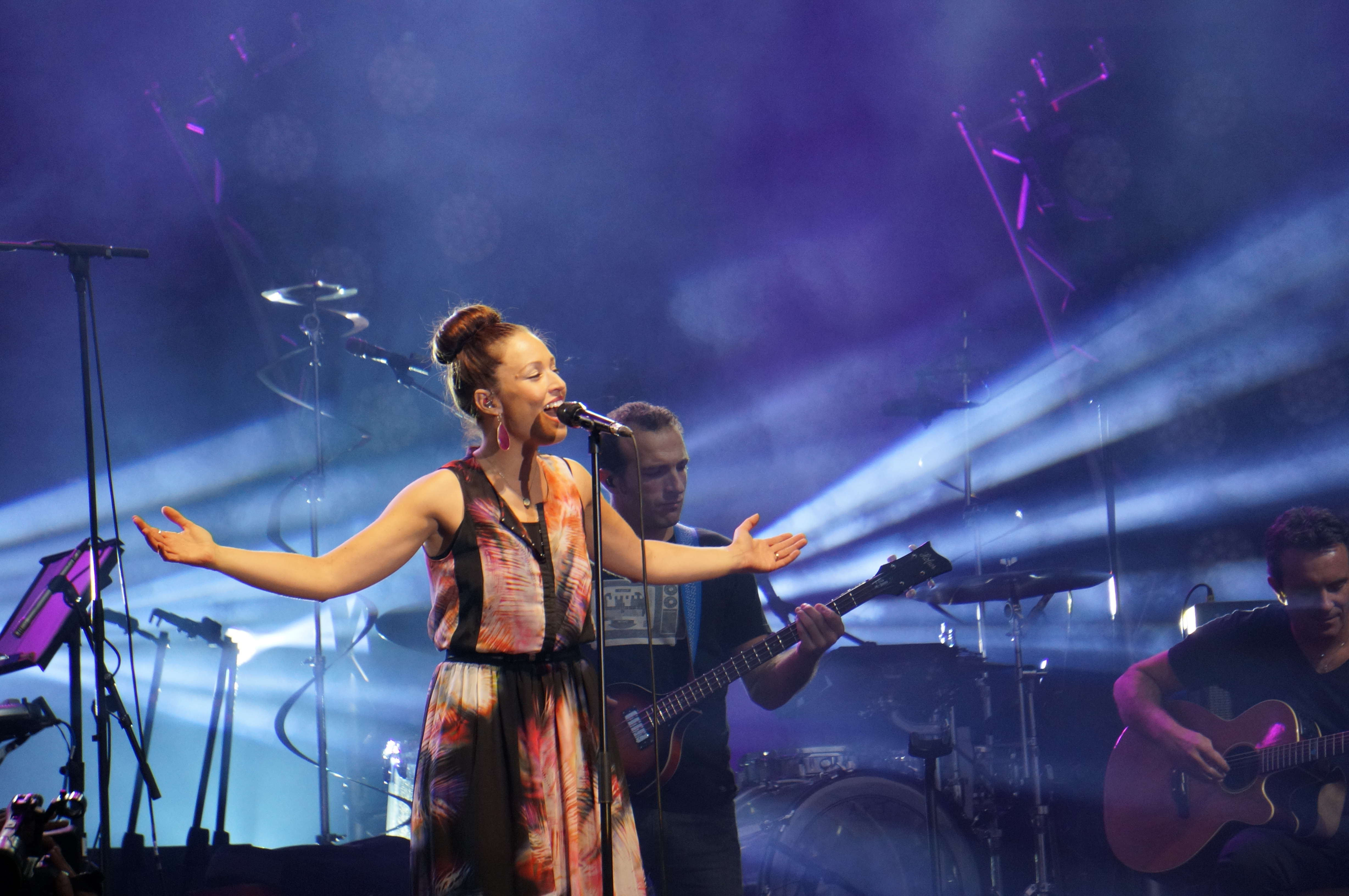 lors du concert de Natasha St-Pier à Châlons en 2014.